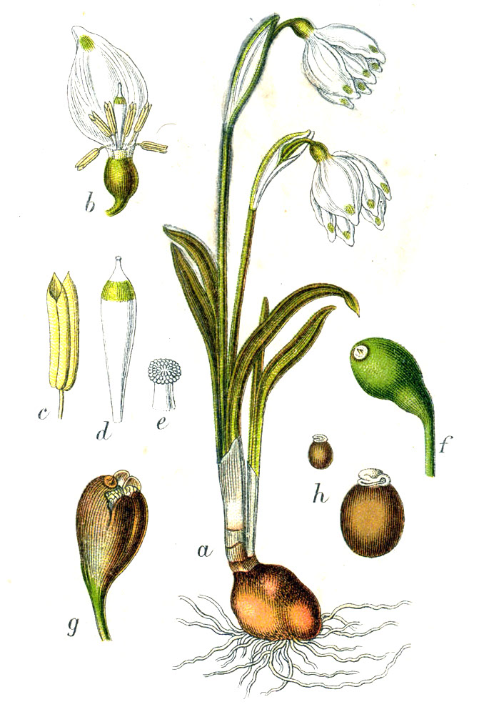 Leucojum vernum L. Original Caption Grosses Schneeglöckchen, Leucojum vernum